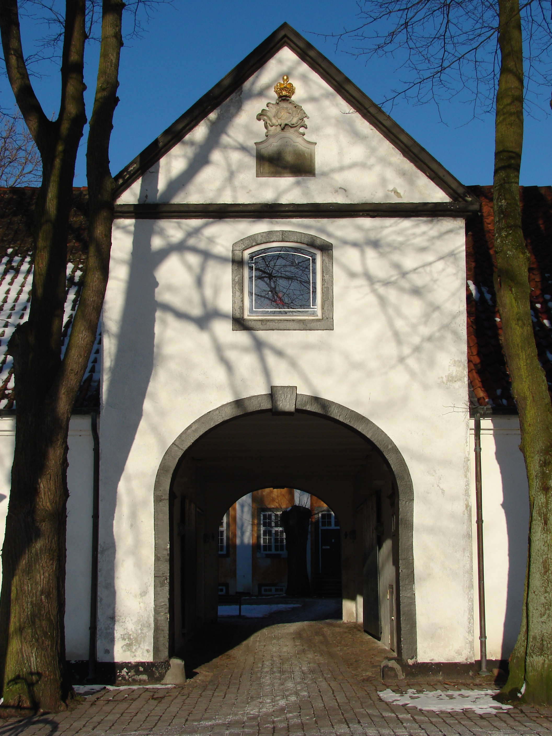 Portbygning Kastrupgård i Kastrup, Amager. Oppført af Jacob Fortling.